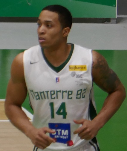 Justin Edwards avec Nanterre 92.